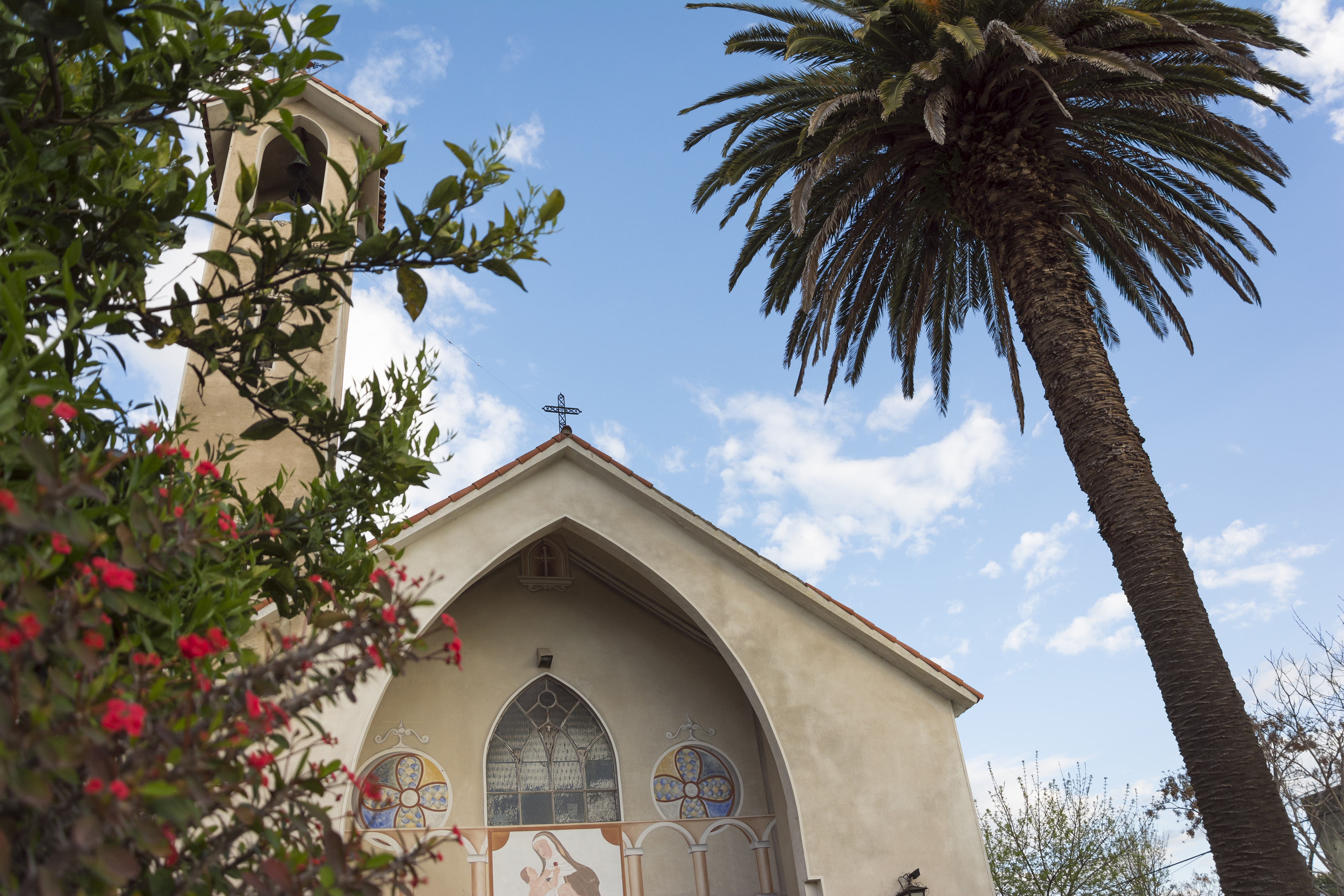 Parroquia Santa Rosa de Lima. Ubicada en el departamento de Canelones